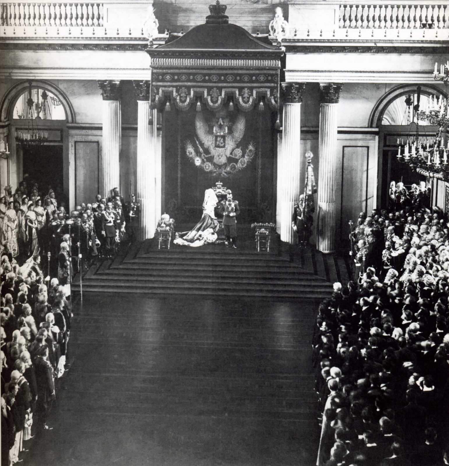 Apertura de la Duma imperial rusa el 10 ed mayo de 1906 (27 de abril del calendario juliano). A la izquierda, los diputados elegidos por el zar, a la derecha, los elegidos por votación popular.